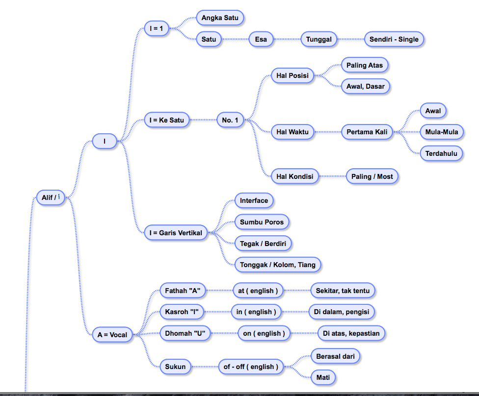 Penjelasan dari Huruf Alif berdasarkan makna hurufnya